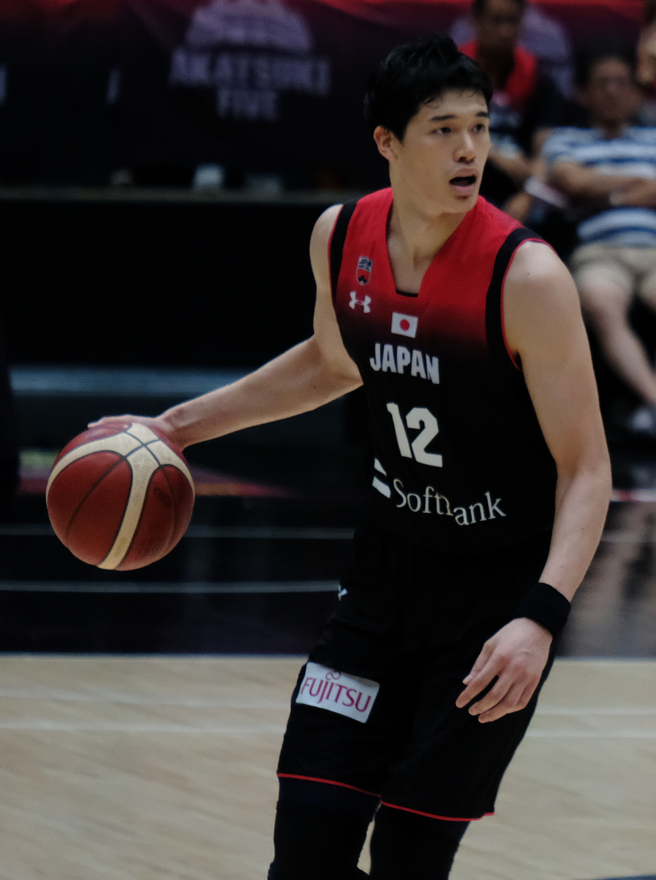 Basketball Japan vs Tunisia AkatsukiFive 20190825